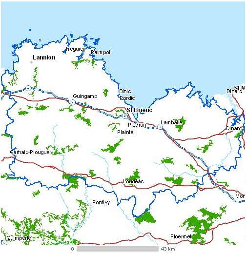 Carte du département Côtes d'Armor Légende